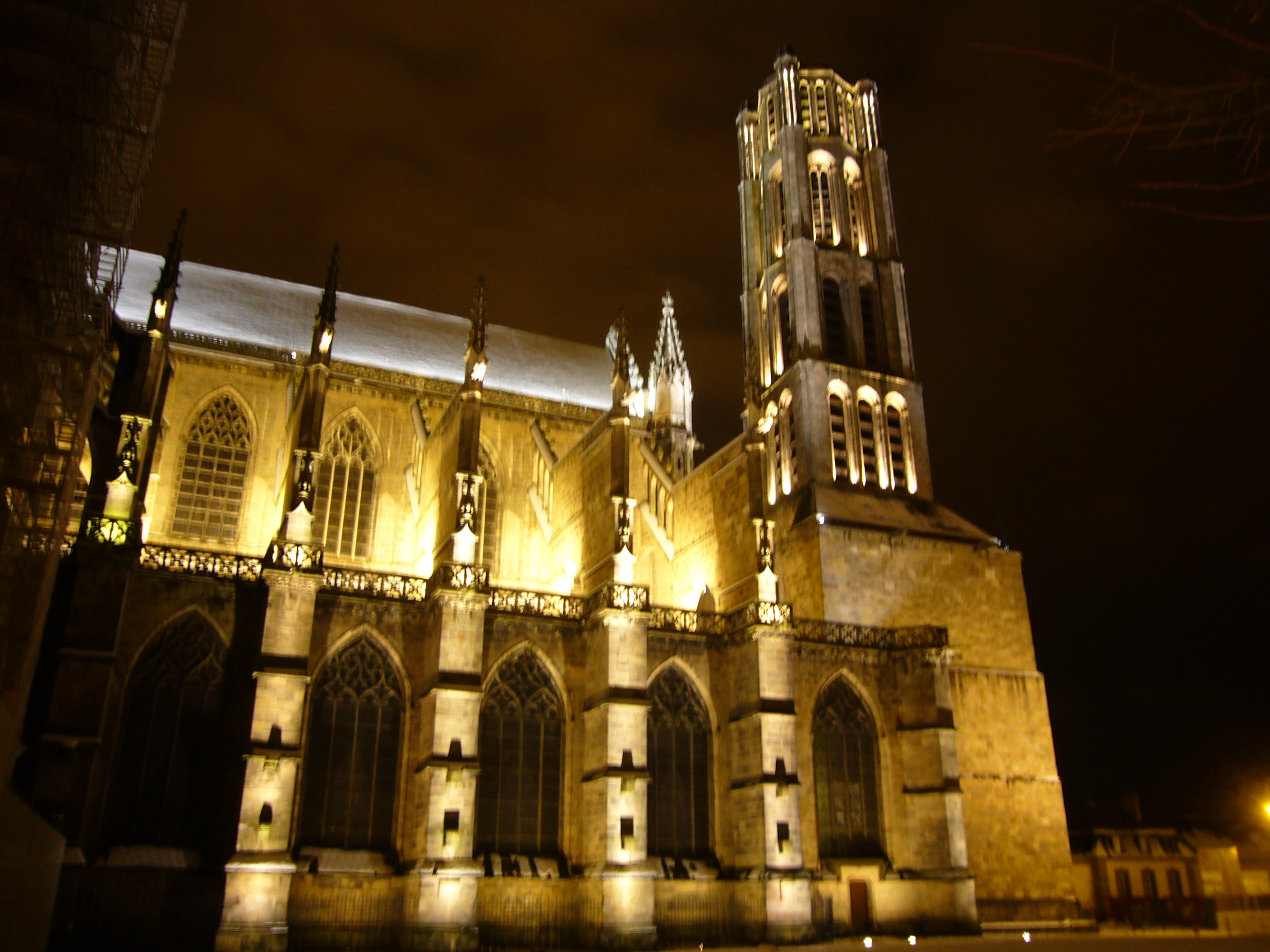 Vue nocturne de la cathédrale Saint-Étienne de Limoges (Haute-Vienne, France)